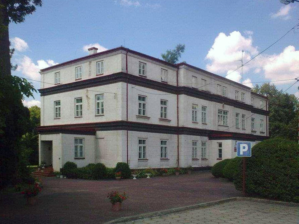 Dwór w Strzałkowie